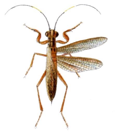 Mantoida nitida